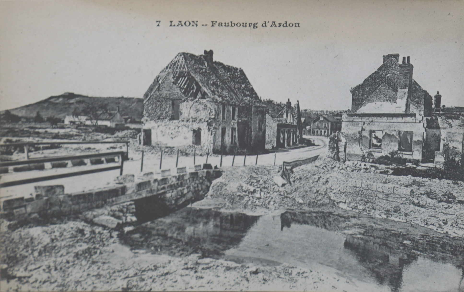 les destructions du faubourg d'Ardon sur une Cartes postales de Laon.